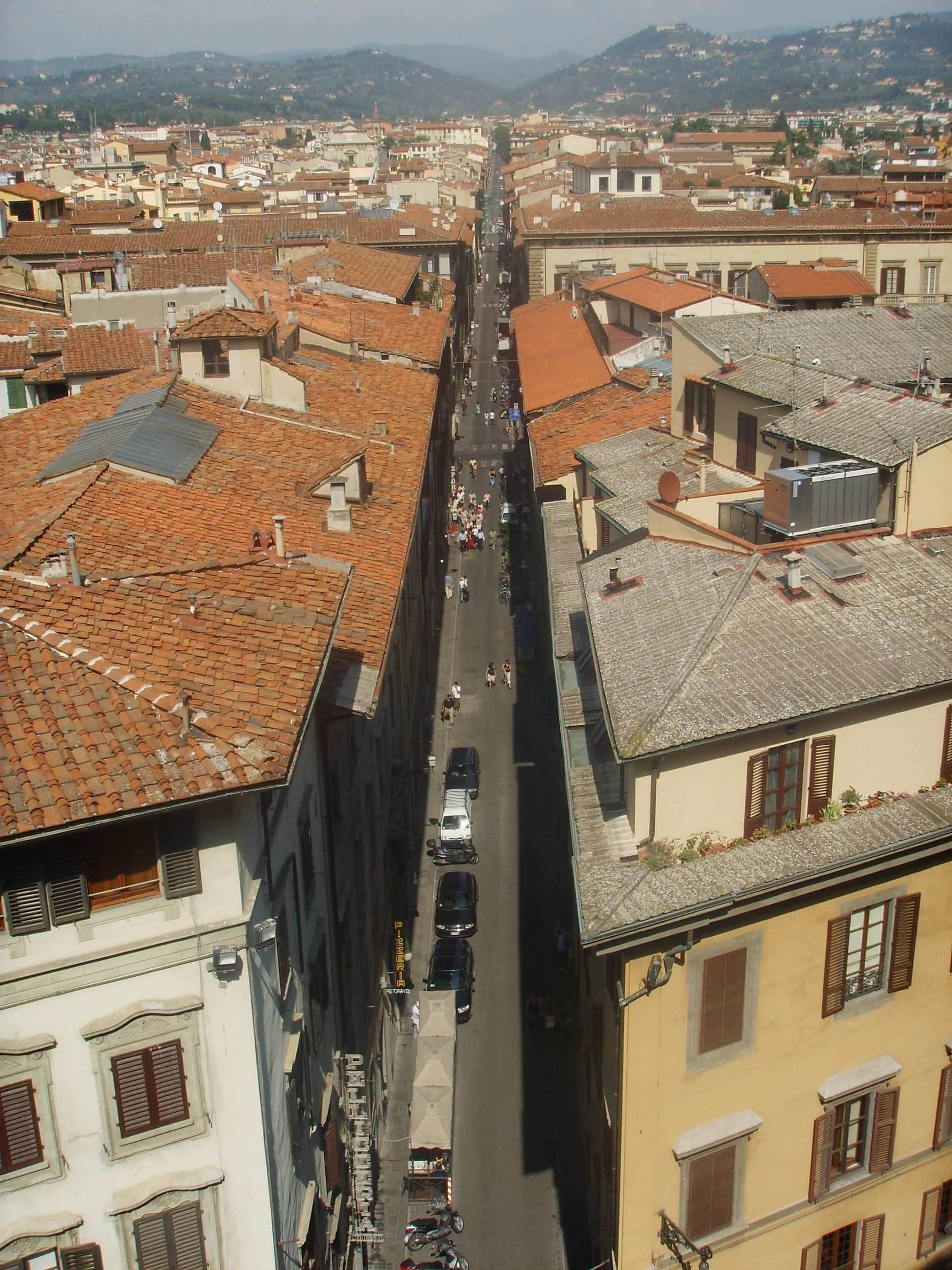 Via Ricasoli in Florence, italy